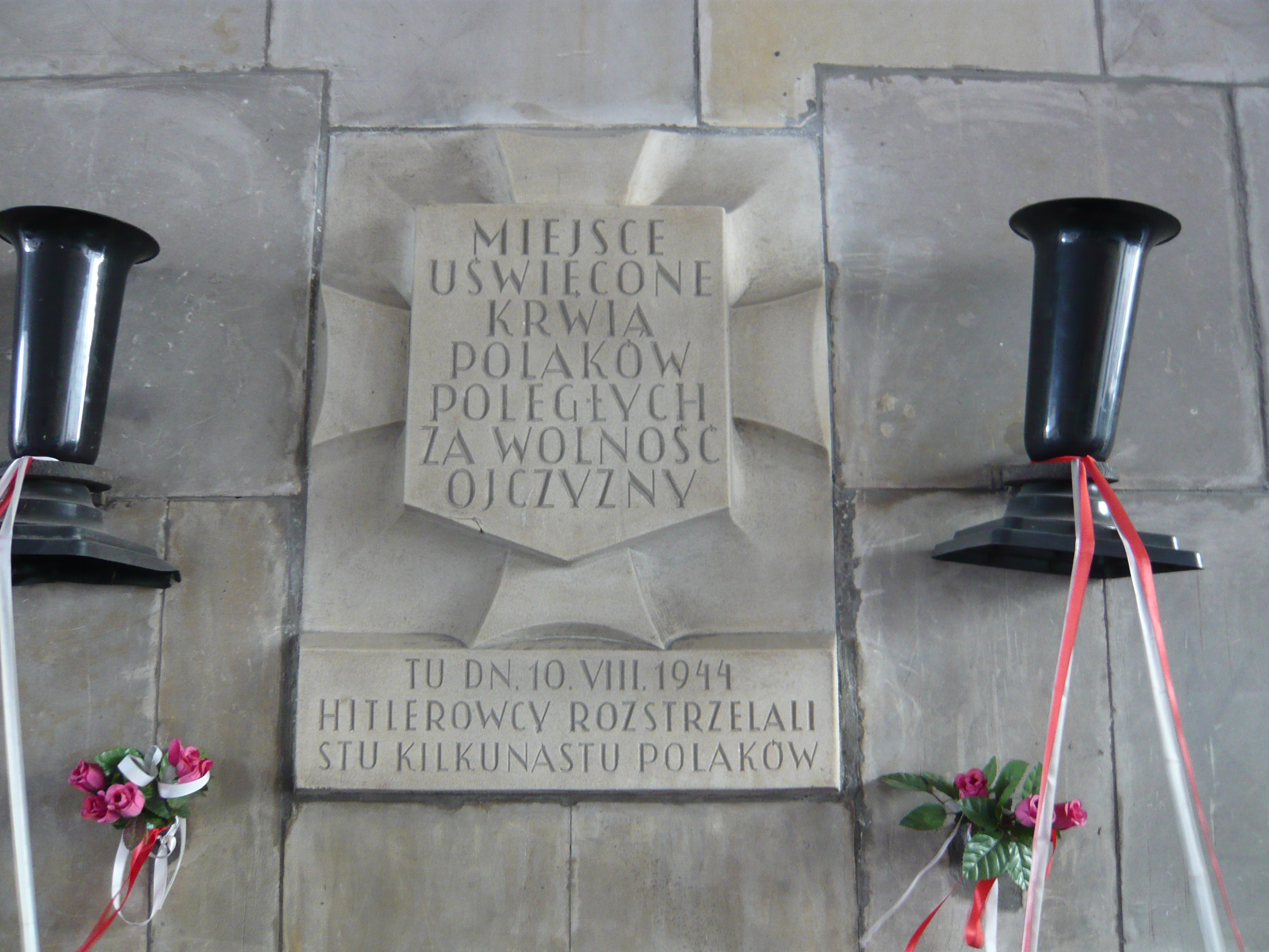 Tablica upamiętniająca śmierć Polaków podczas II wojny światowej, ul. Kozia, Warszawa